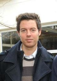 Charles Luylier, en 2012.